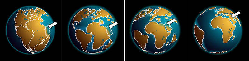 Secuencia de la ubicación del observador del Génesis a través del tiempo sobre la deriva continental.